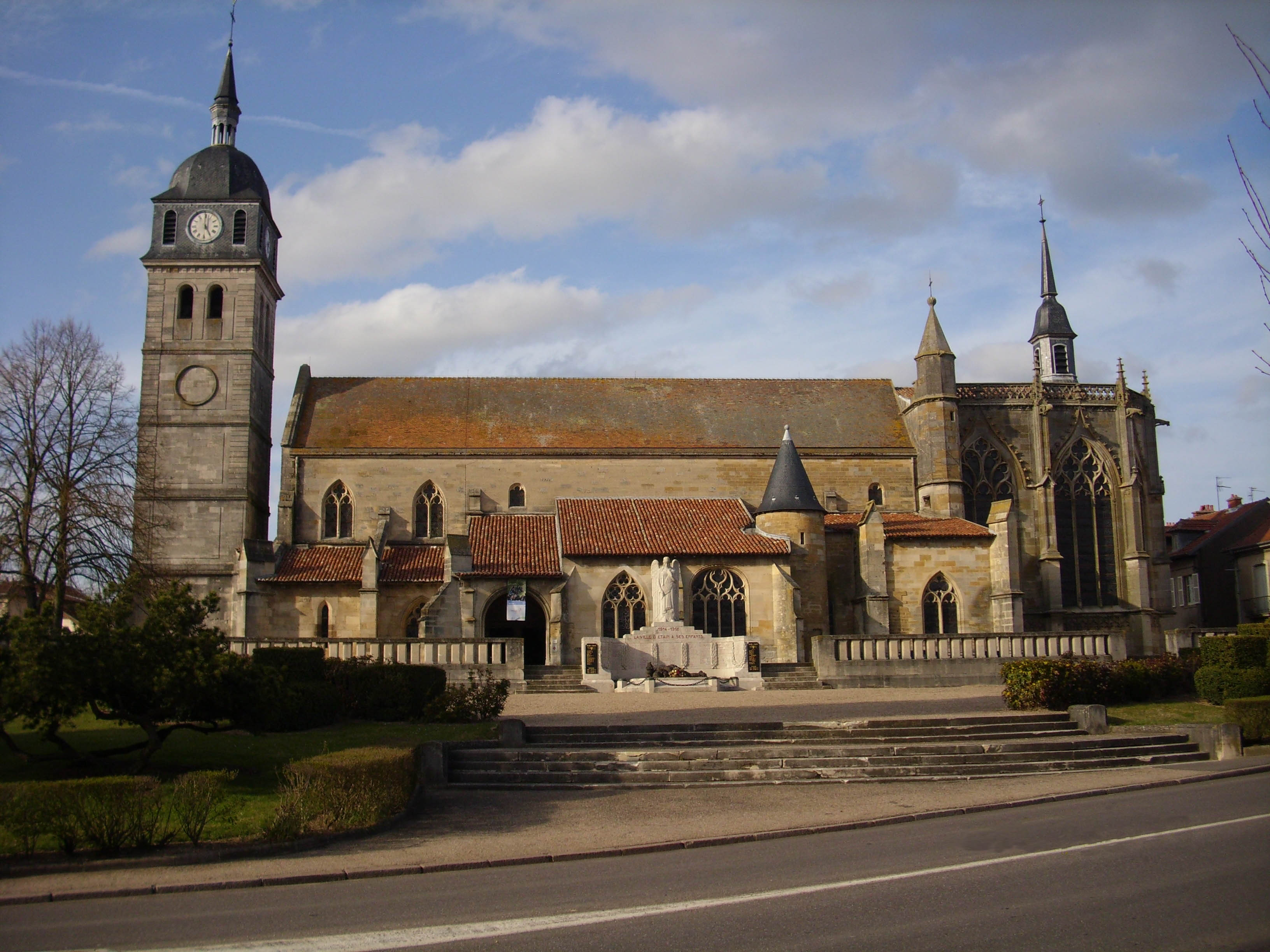 Vue de l'église Saint-Martin d'Etain (FR-55400), monument historique, depuis la place de la Martinique.